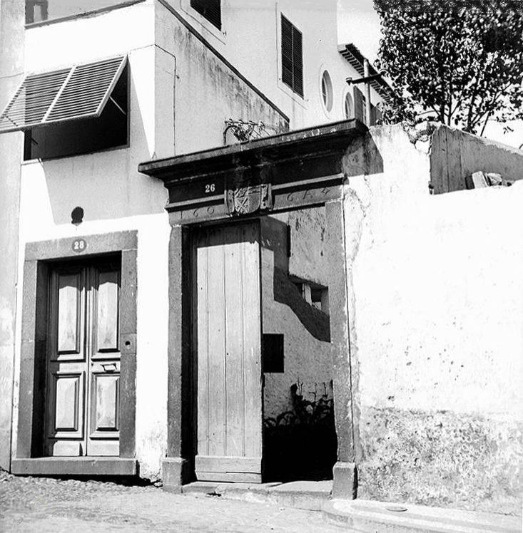 Entrada do Solar de D. Mécia. Cantaria regional, 1606. Brasão de armas dos Ornelas, Magalhães, Joannes (ou Miranda, ou Amaral) e Meneses (ouro pleno). Fotografia da DRAC e dos Monumentos Nacionais de 1940 (c.). Hoje sede da Associação Comercial do Funchal. Rua dos Aranhas, 26, Funchal, ilha da Madeira.